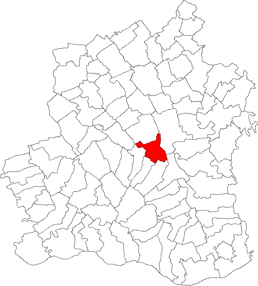 Categorie:Hărţi ale judeţului Teleorman